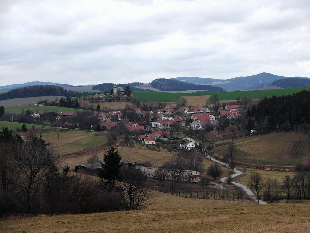 Vítochov, část města Bystřice nad Pernštejnem